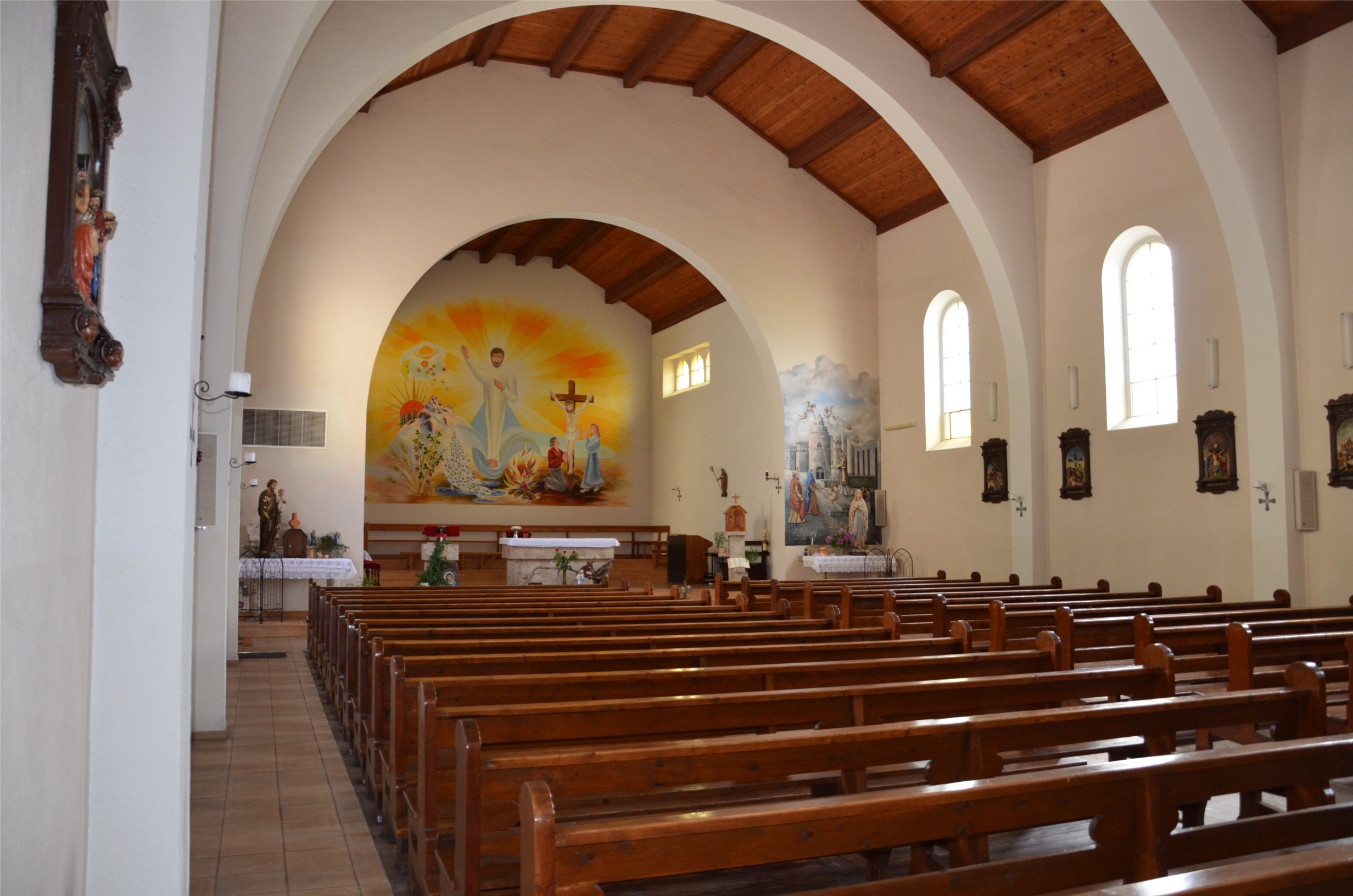 Vue d'ensemble de l'intérieur de l'église du Christ-Roi de Fey.